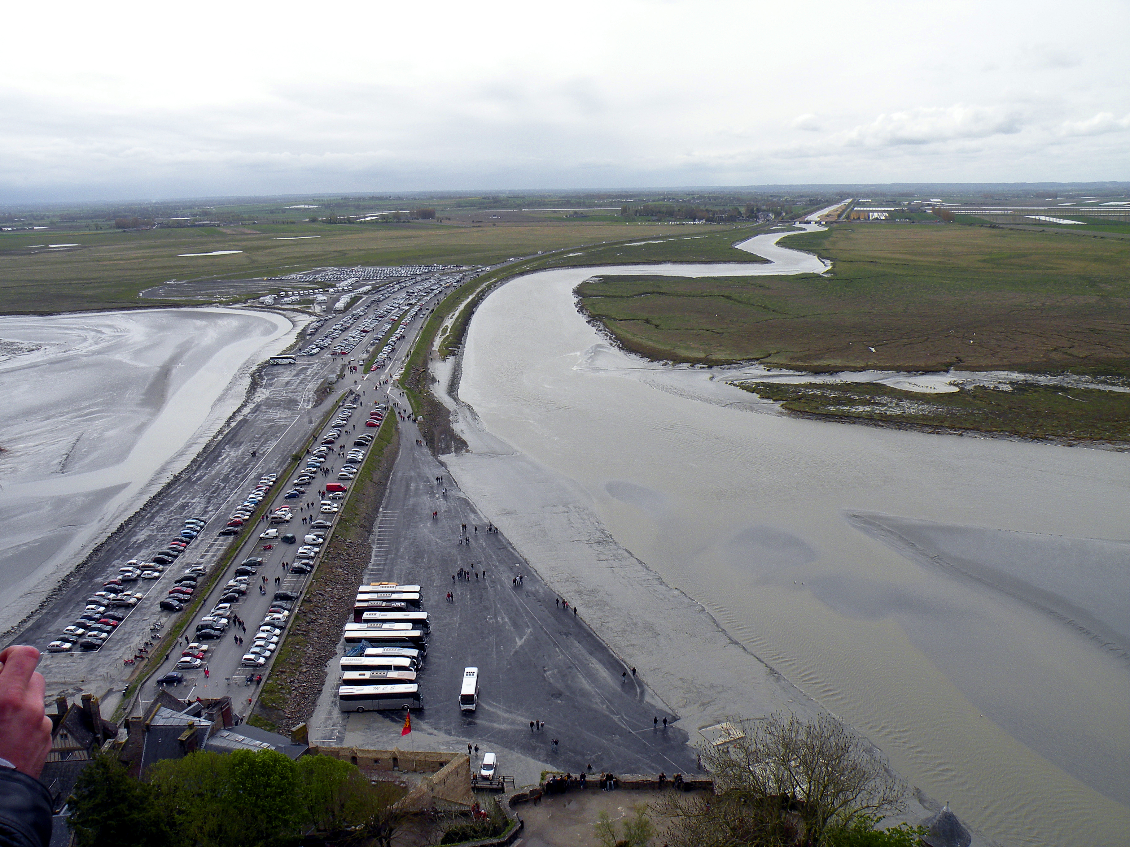 Мон-сен-Мишель.Дамба и устье реки Кузон